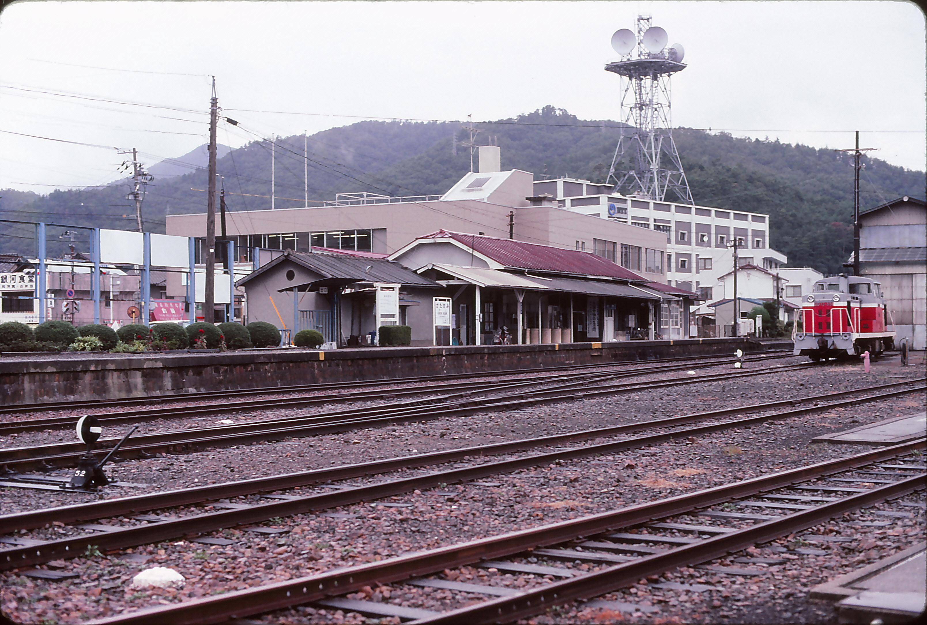 現時のマックスバリュ備前店付近から撮影 後方の クリーム色の建物は備前郵便局 アンテナはＮＴＴ西日本備前電話交換所